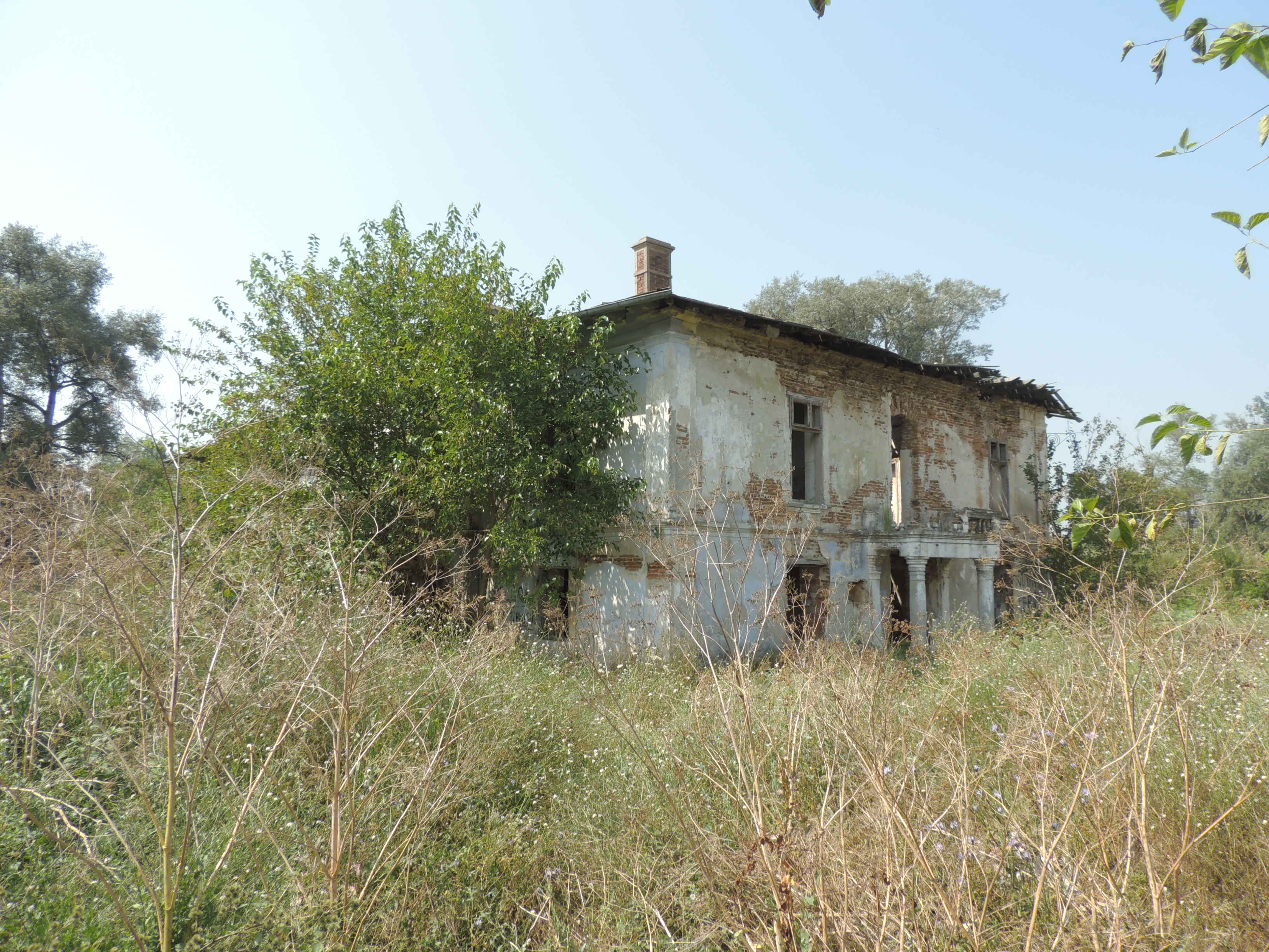 Vedere Nord-Est